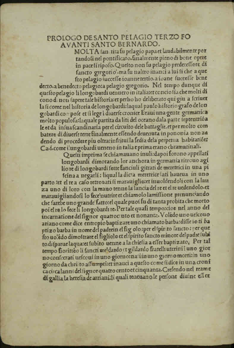 Historia de gestis Langobardorum (italiano). - [Firenze] : [Antonio Miscomini], [1480]. - 12 c. ; a⁸, b⁴ ; 4°.